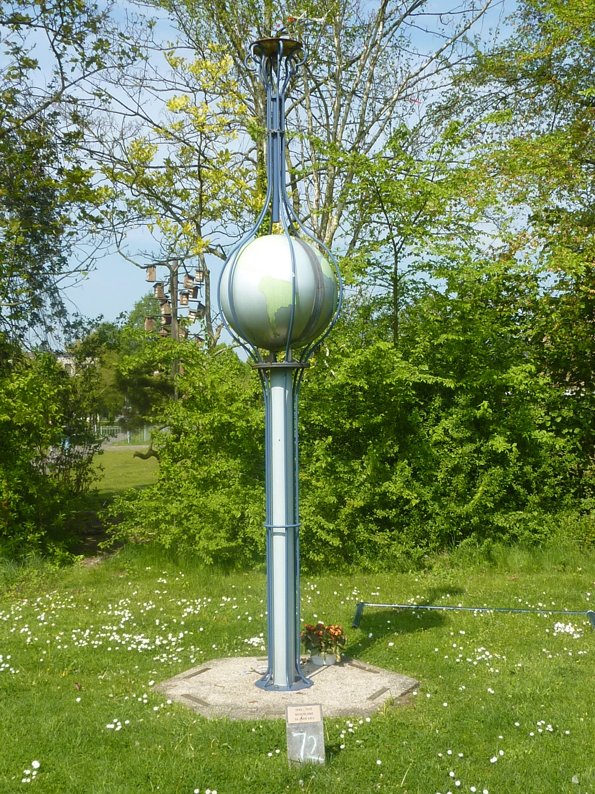 Bevrijdingsmonument De Meern d.d. 1995